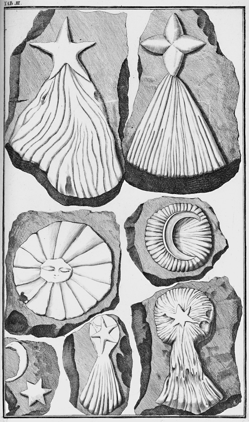 Tafel 3 aus Johann Bartholomaeus Adam Beringer: Lithographiae Wirceburgensis, Würzburg, Fuggart, 1726. (Würzburger Lügensteine)